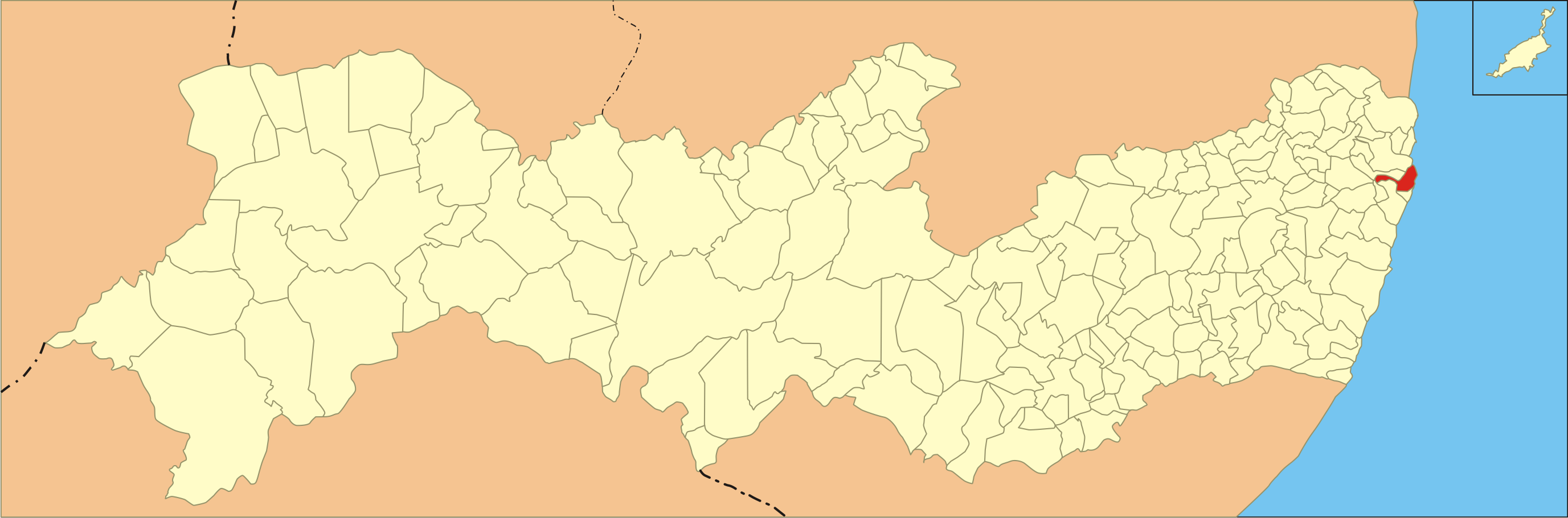 Localização de Paulista em Pernambuco.